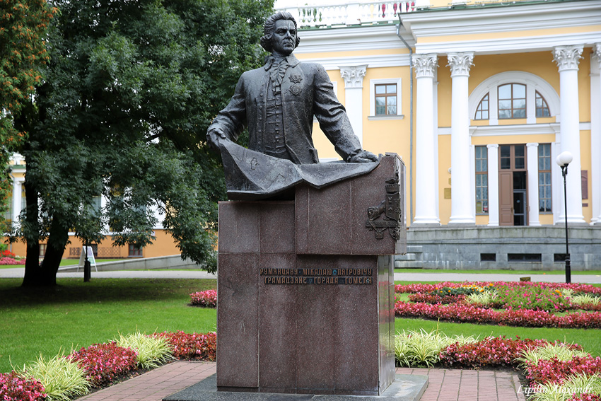 Гомельскі палацава-паркавы комплекс. Помнік